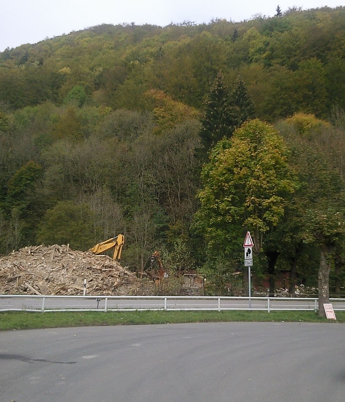 Raststätte Netzkater - Parkplatz, Blick auf die Reste des abgerissenen 'Hotel Netzkater' (alte Ausflugsgastätte mit Hotel, bestehend seit vor 1900 - nach der Wende leerstehend)